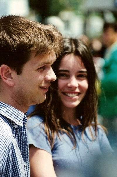 Gaël Morel et Elodie Bouchez au festival de Cannes